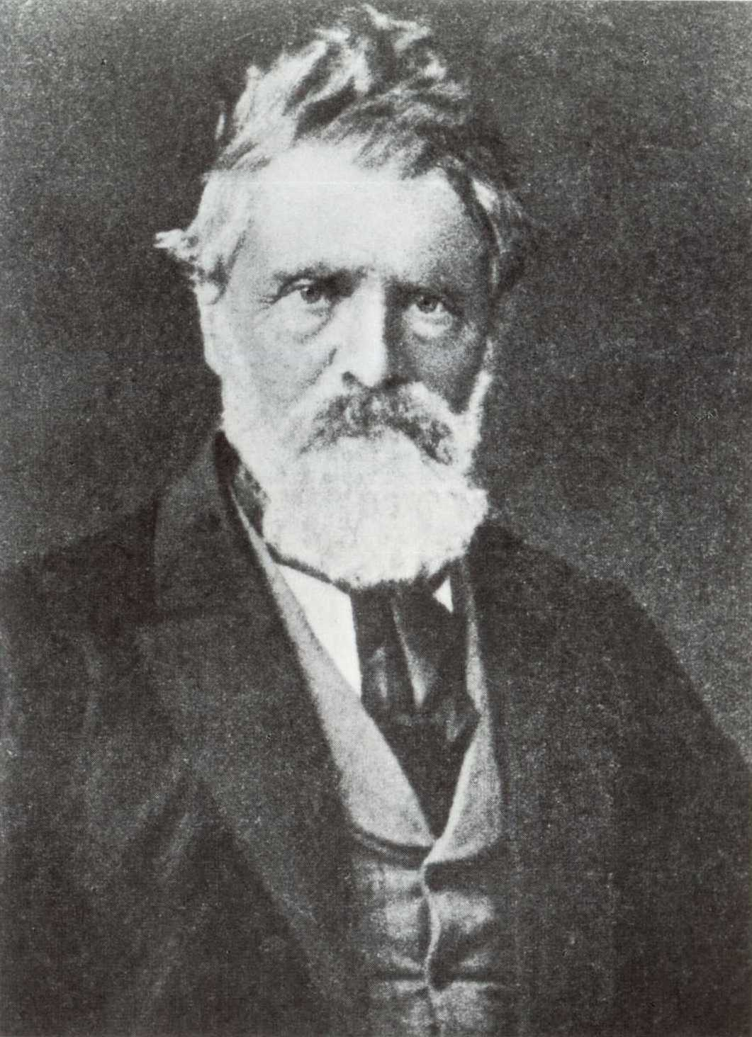 Image of Peder Balke